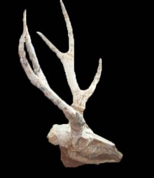 El cervavitus tenia un hocico corto y su cornamenta era de pico similar a la de un ciervo